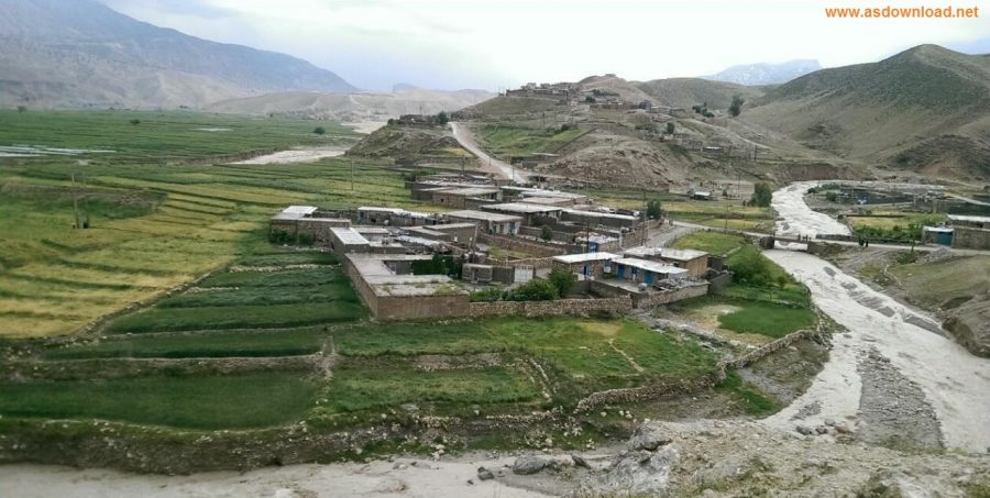 روستای دره بنیاب در یک روز بارانی